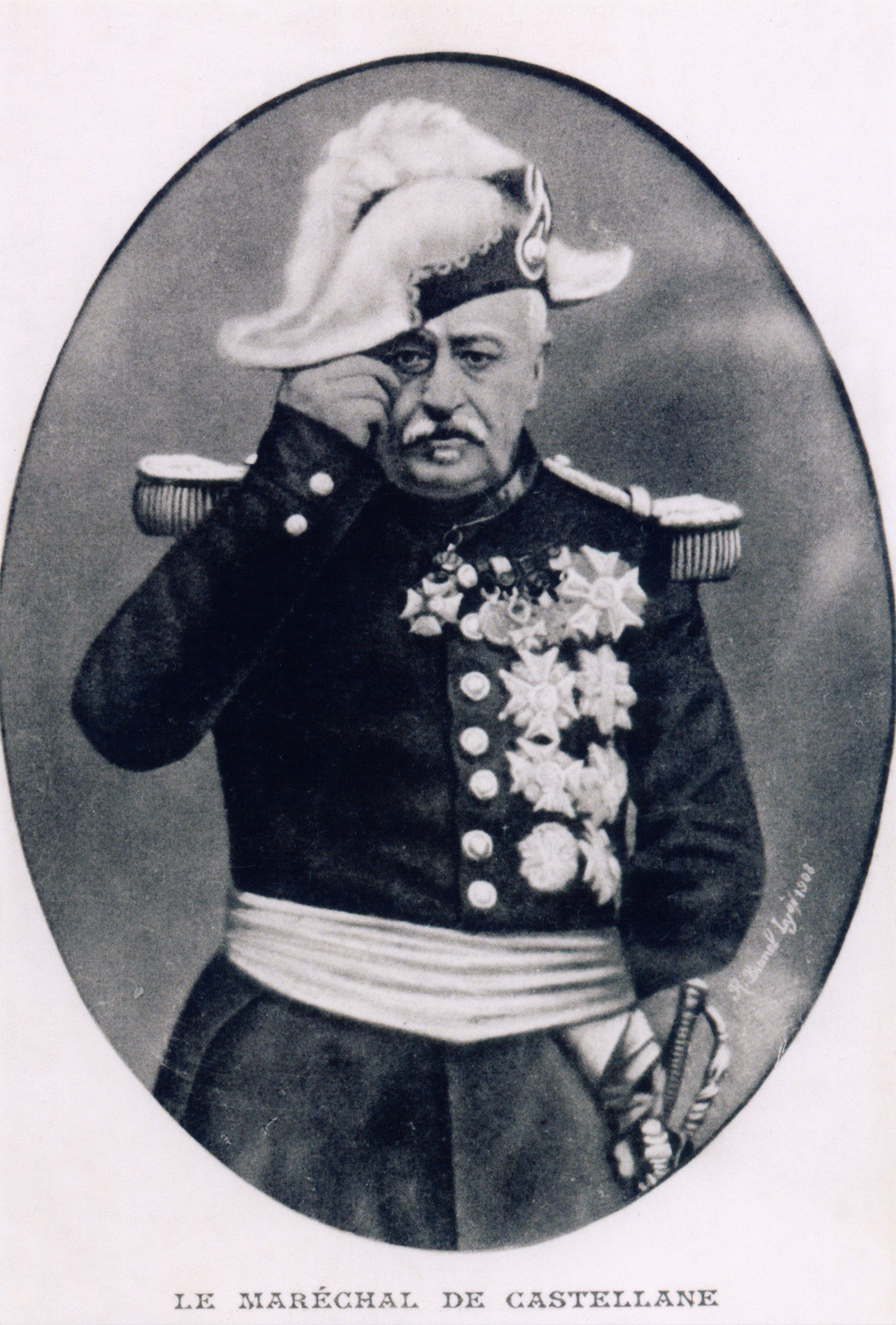 Le Maréchal de Castellane.